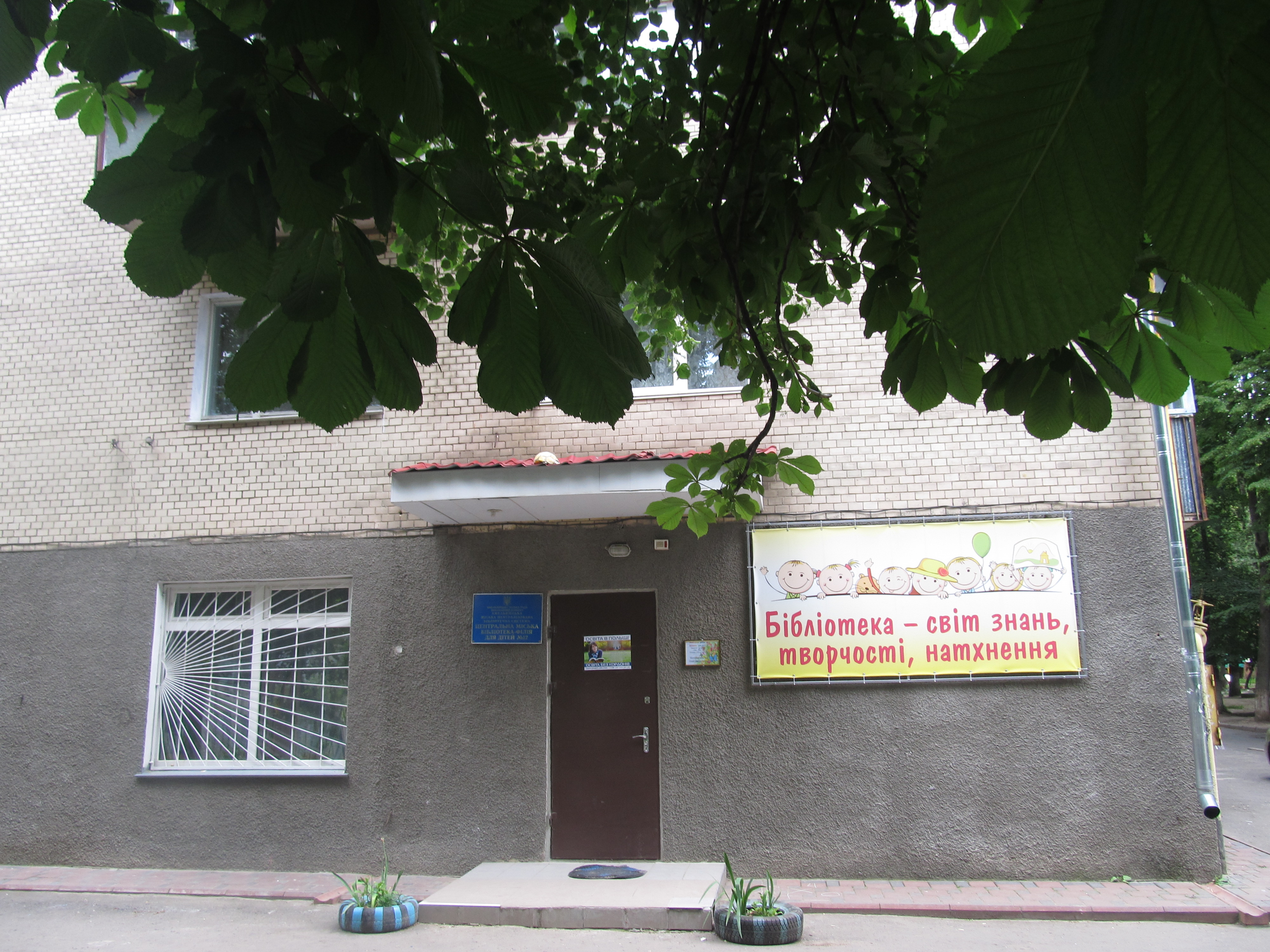 Бібліотека-філія для дітей №12 Хмельницької міської ЦБС запрошує читачів ознайомитись з новими книгами!